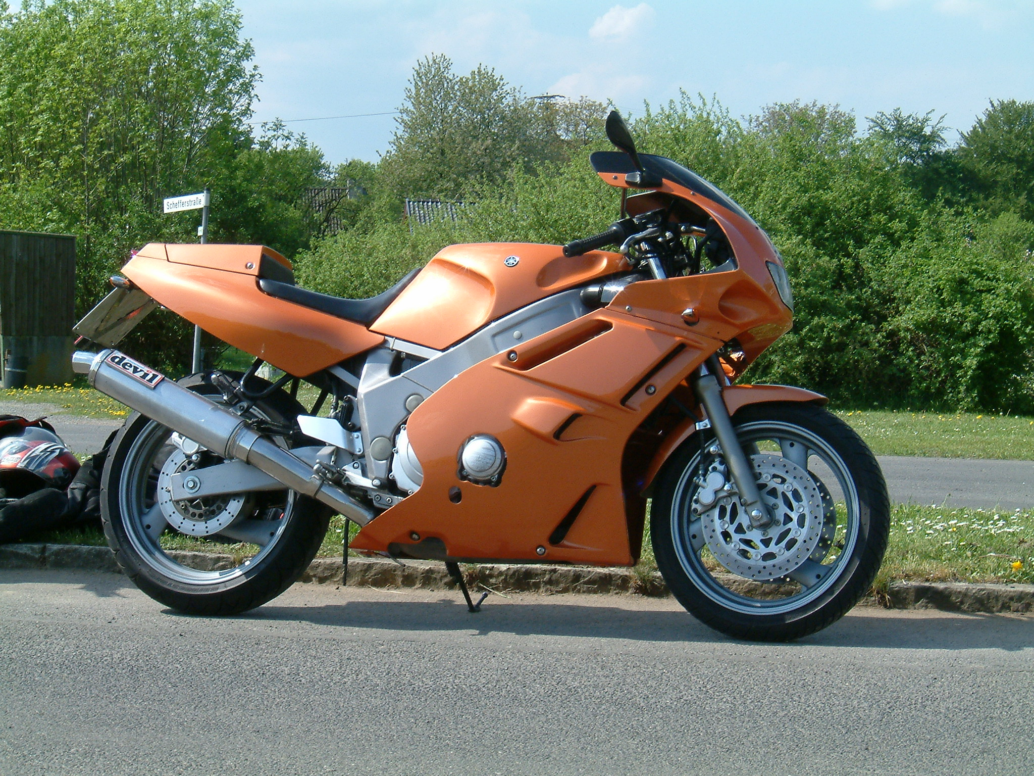 FZR600 3HE Bj 92